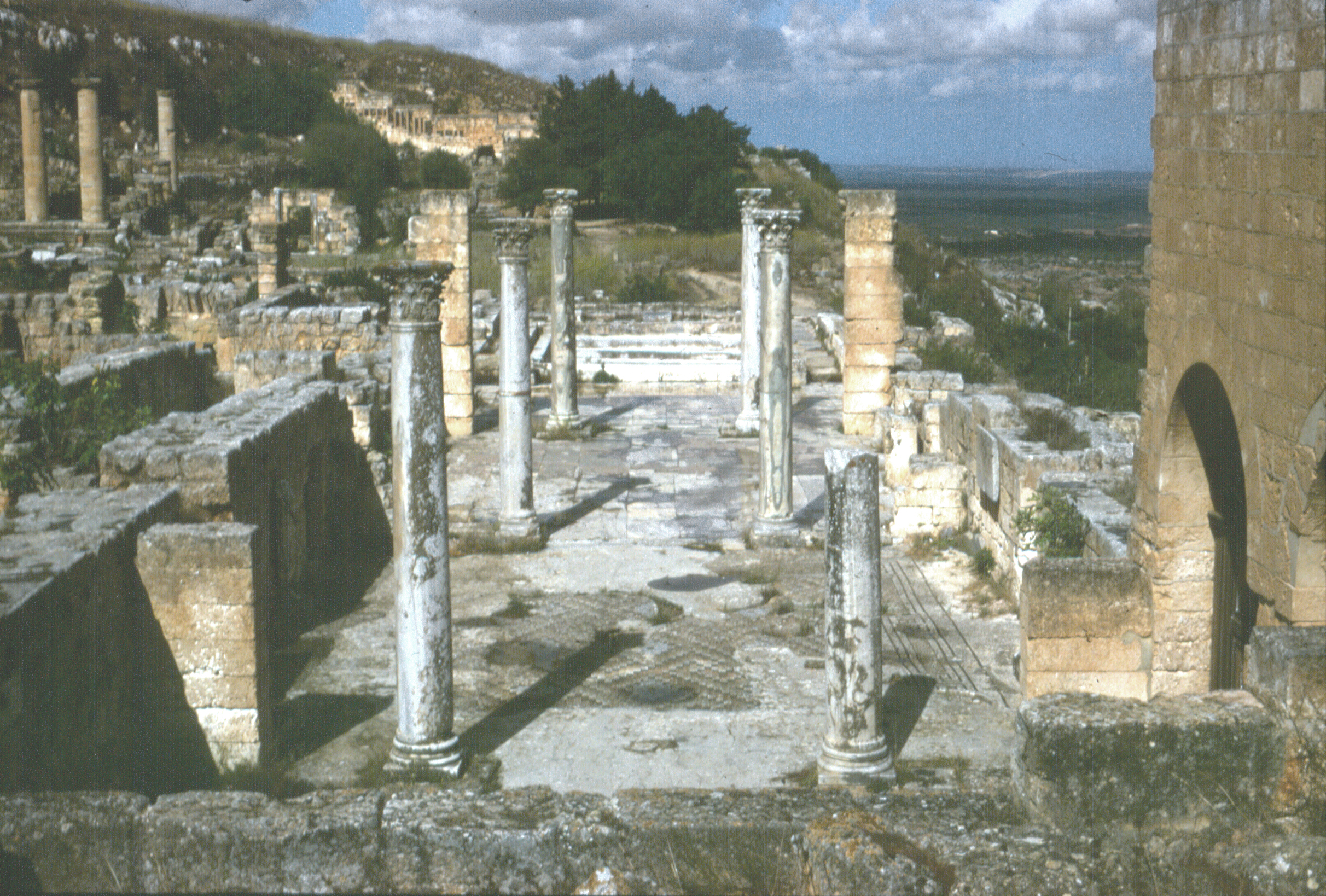 Libia, Cirene (sito archeologico), Terme di Traiano